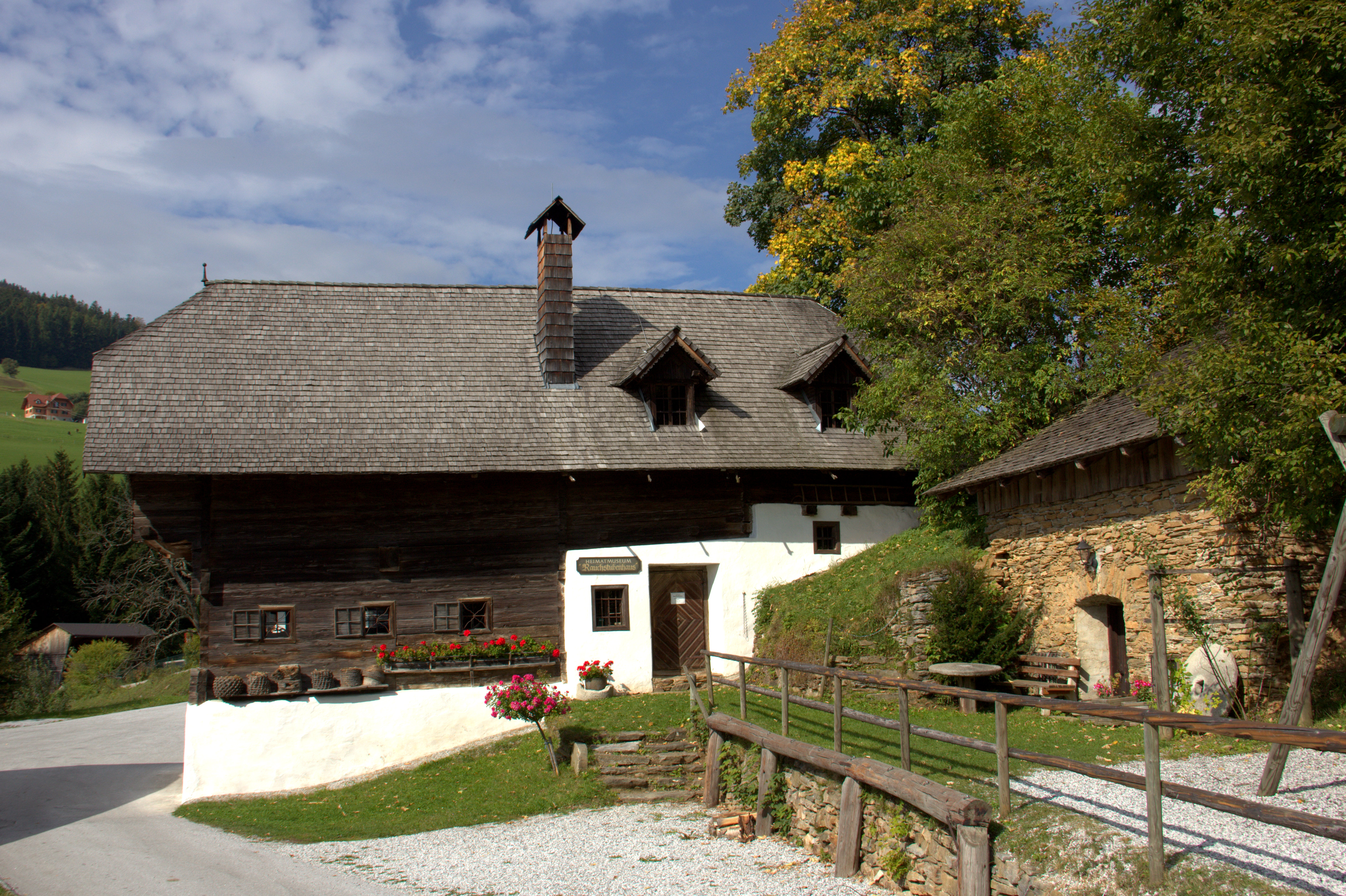 Heimatmuseum "Rauchstubenhaus" Edelschachen bei Anger